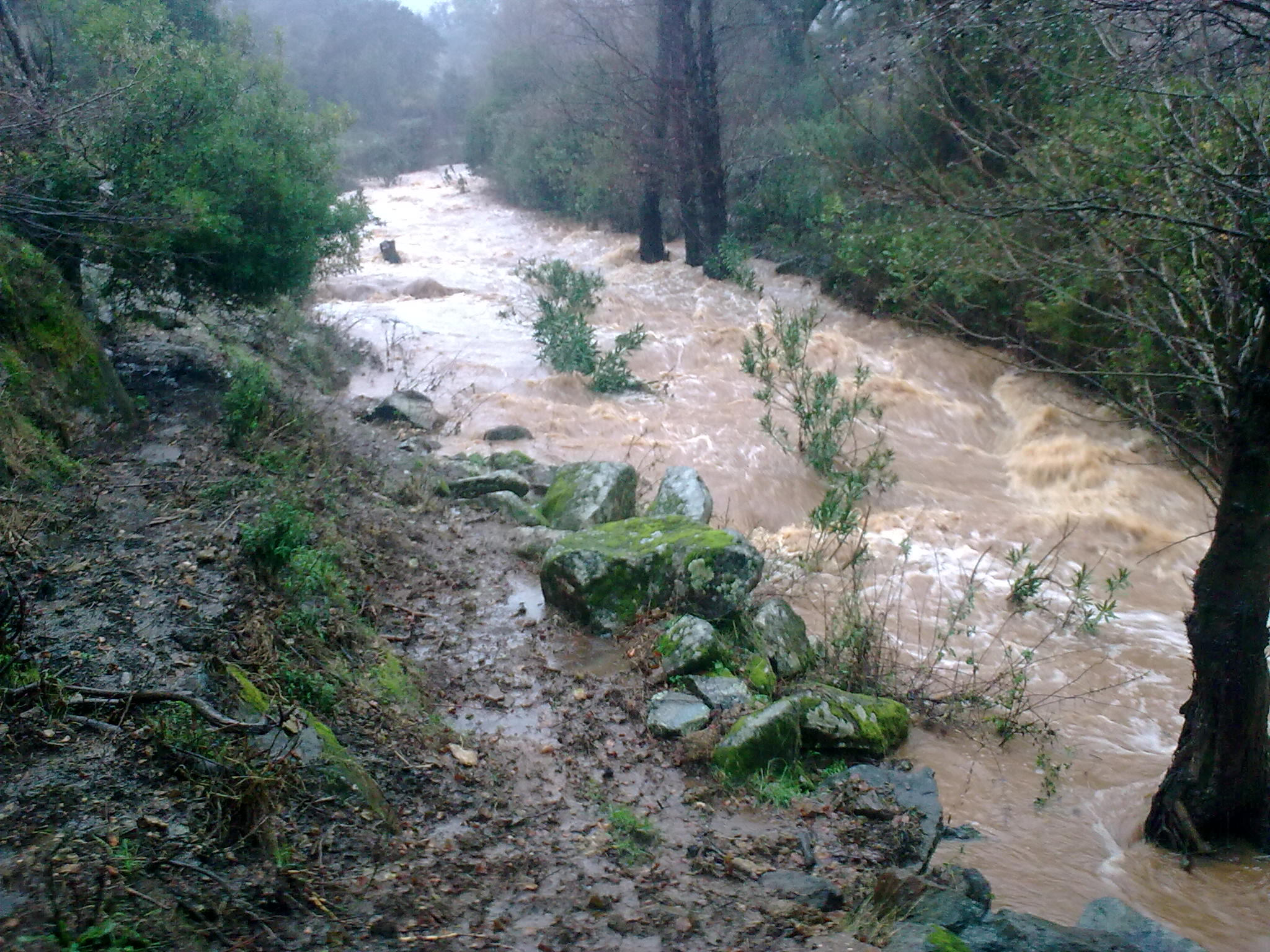 Barranco del Moro (Gil Márquez)